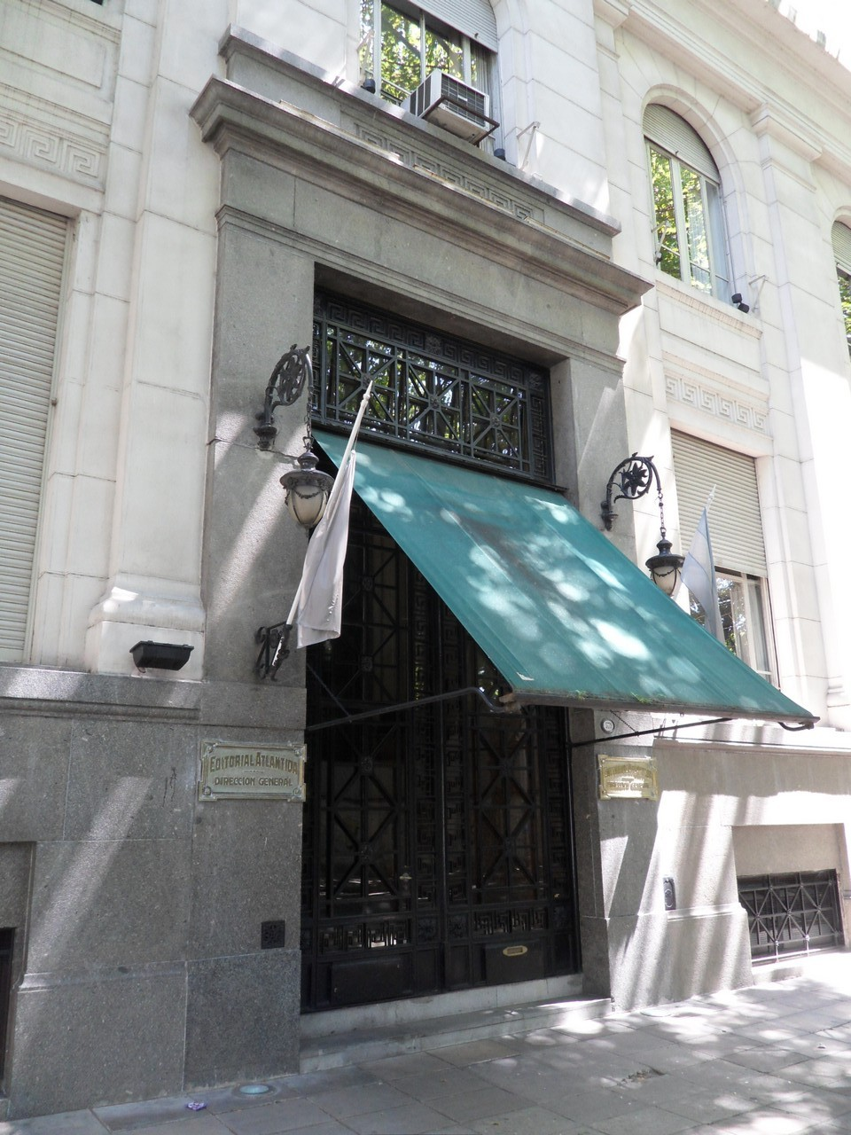 El frente de Editorial Atlántida, en la calle Azopardo